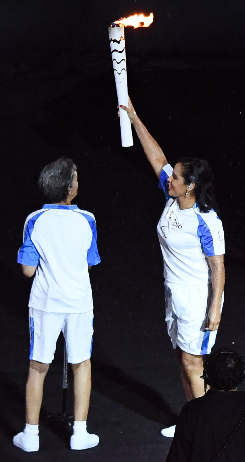 Rio de Janeiro - Cerimônia de abertura dos Jogos Paralmpicos Rio 2016 no Estdio do Maracanã (Tomaz Silva/Agência Brasil)